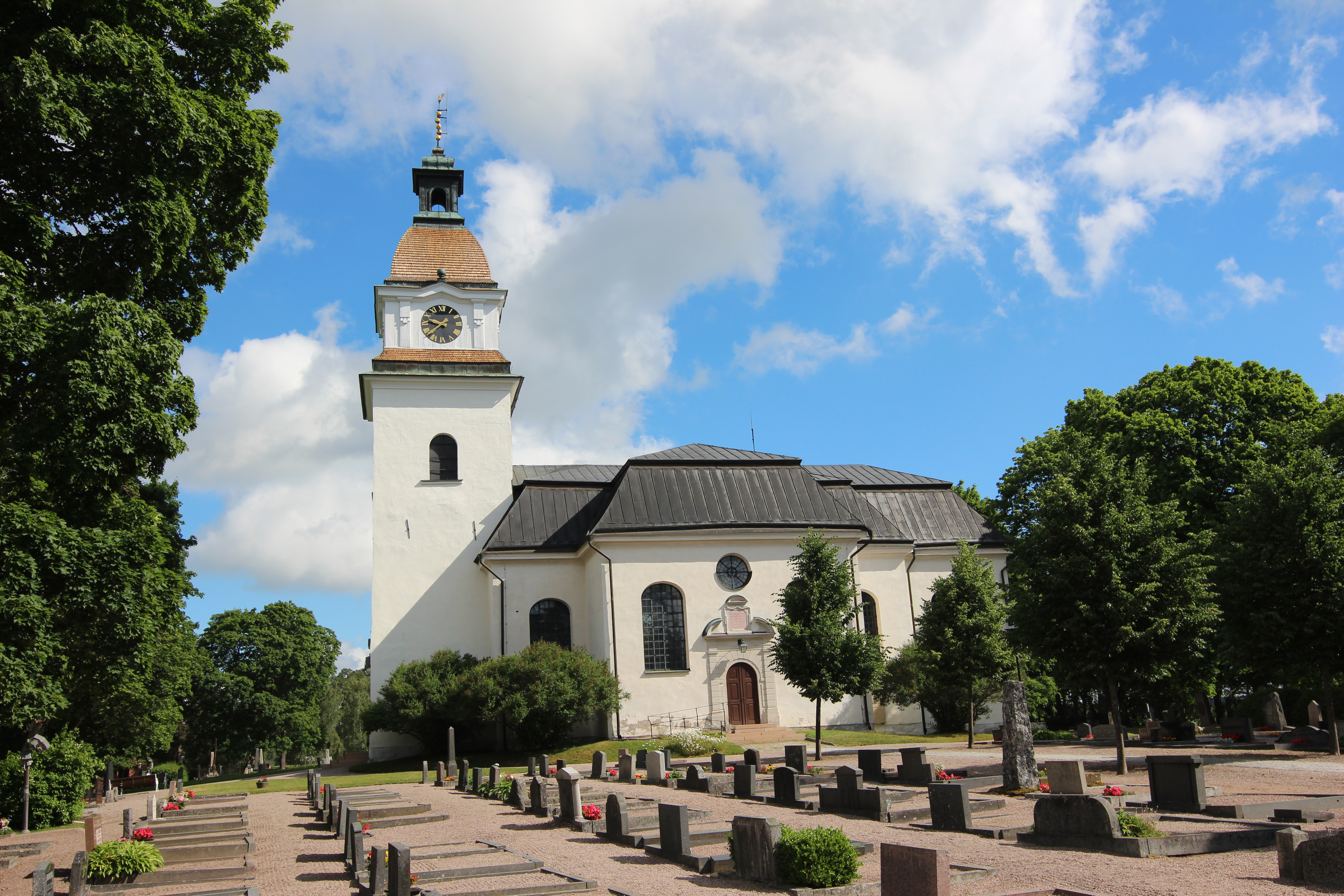 Götlunda kyrka, exteriör